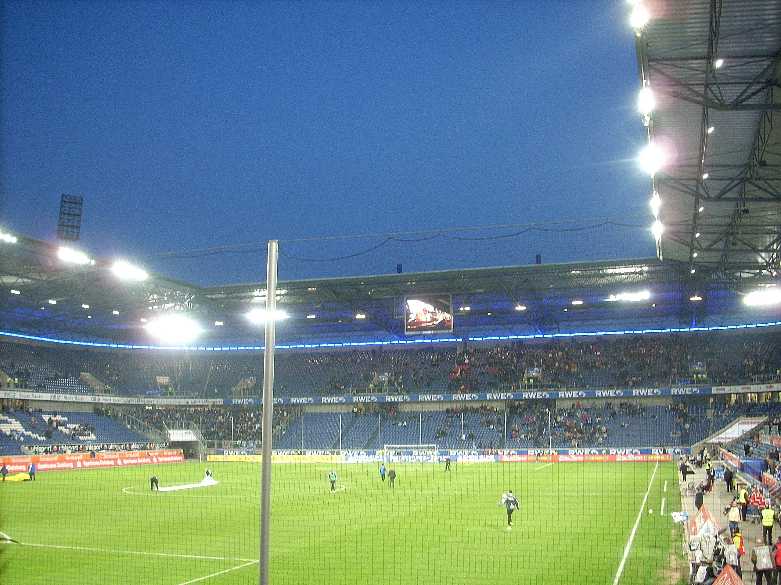 Die MSV-Arena in Duisburg während der Halbzeitpause des Bundesligaspiels MSV Duisburg gegen den Karlsruher SC